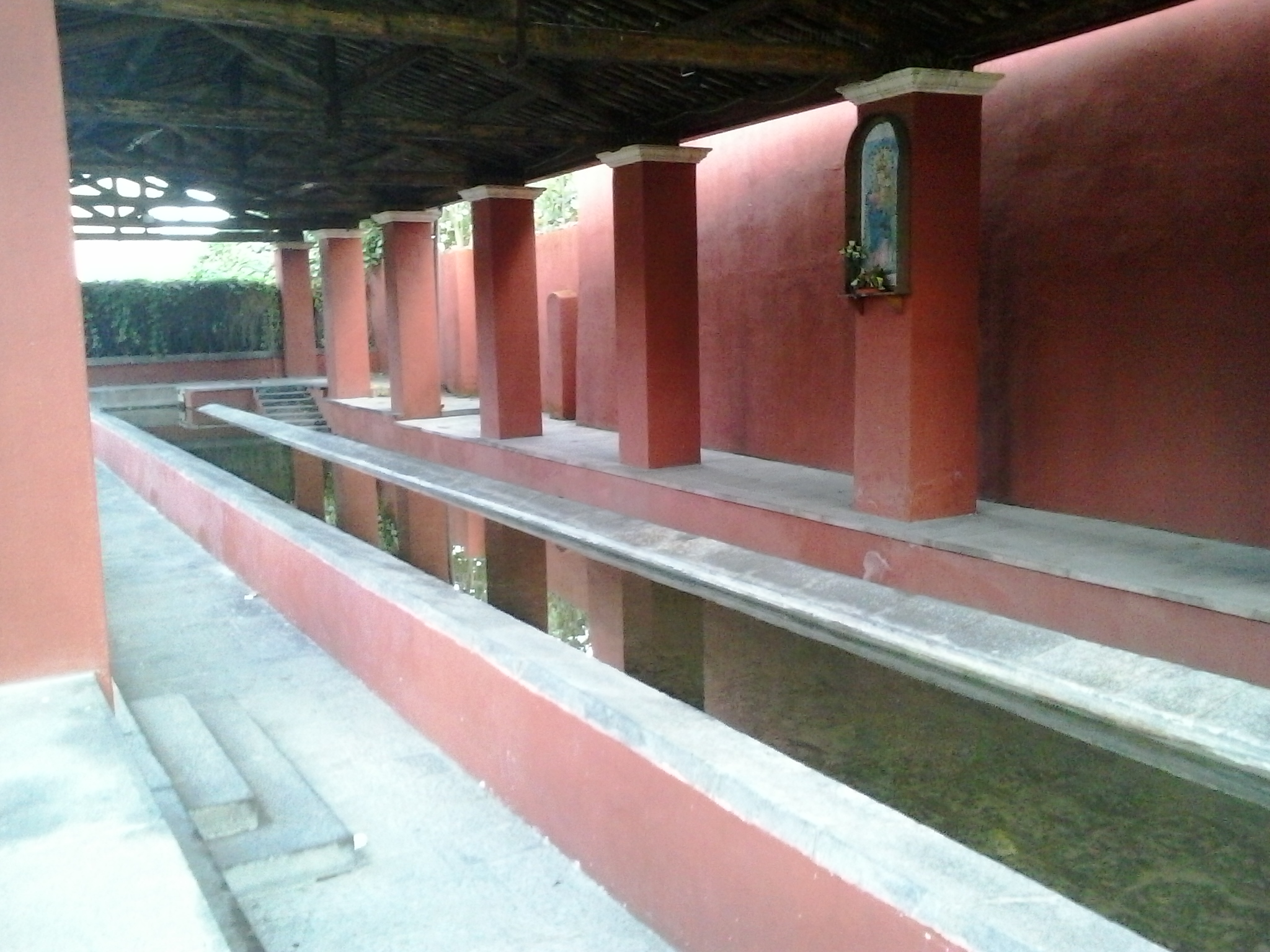 Ex lavatoio pubblico di Cibali, quartiere della città di Catania (CT), risalente al 1671.